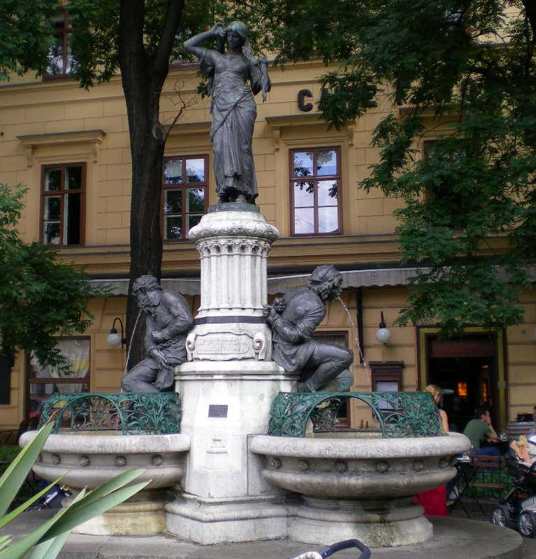 Der Engelbrunnen in der Wiedner Hauptstraße 55